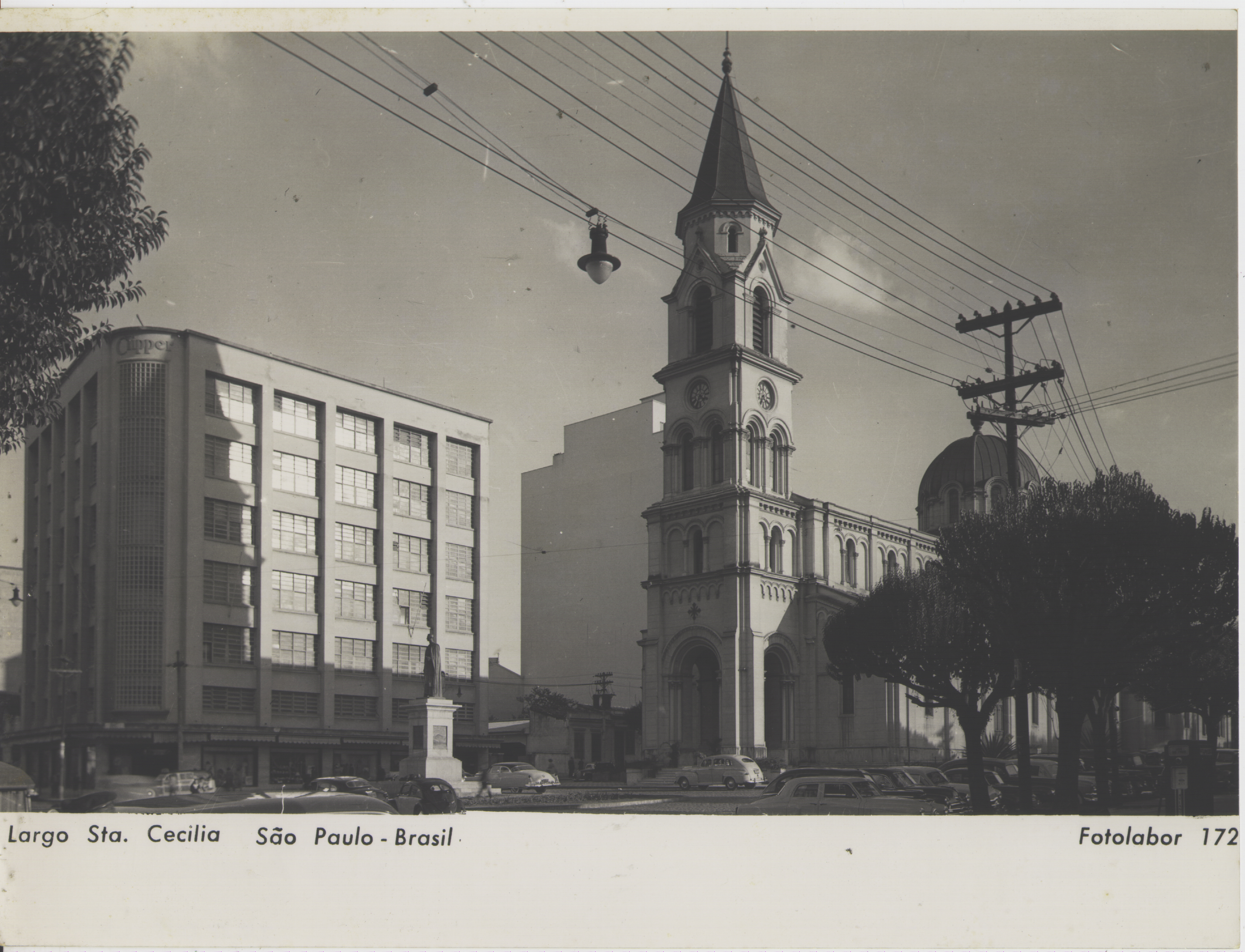 Obra que integra o acervo do Museu Paulista da USP. Coleção Werner Haberkorn